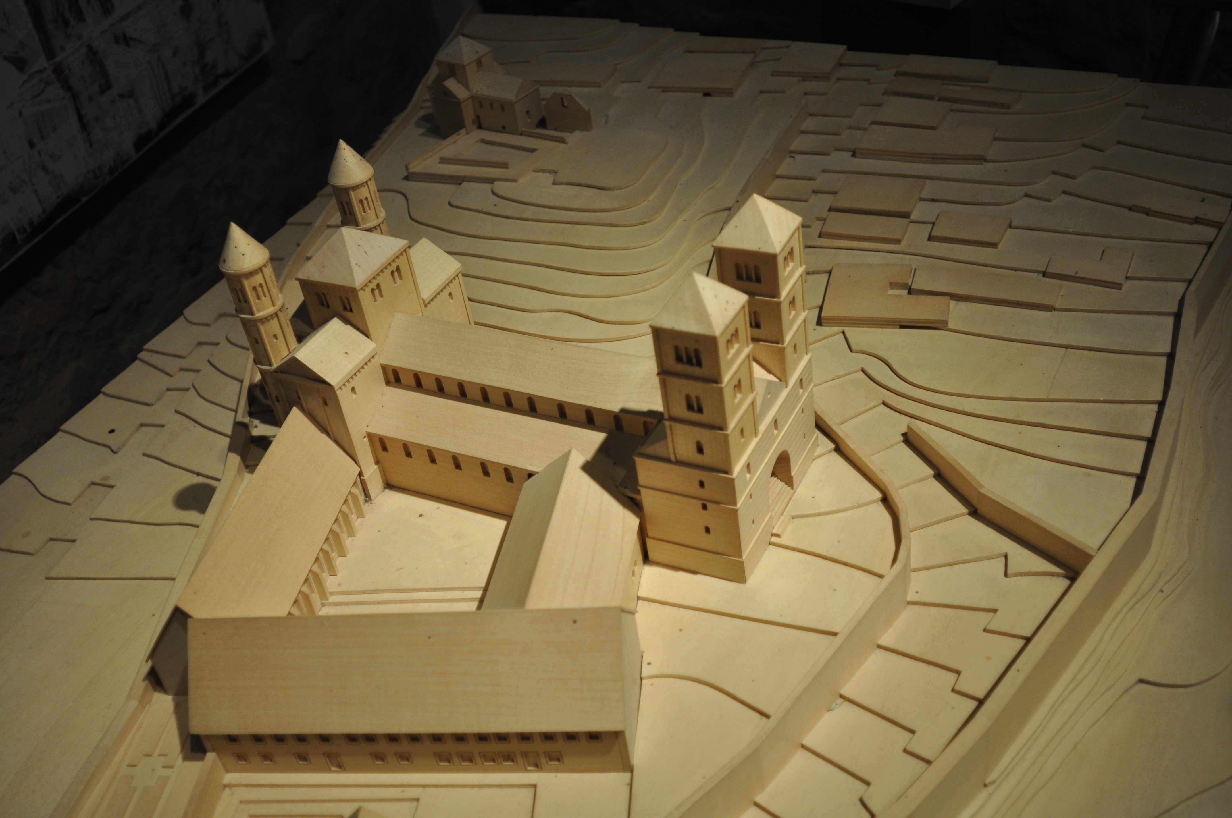 Modell Kloster Hornbach (ca. 11.-16. Jhdt.)